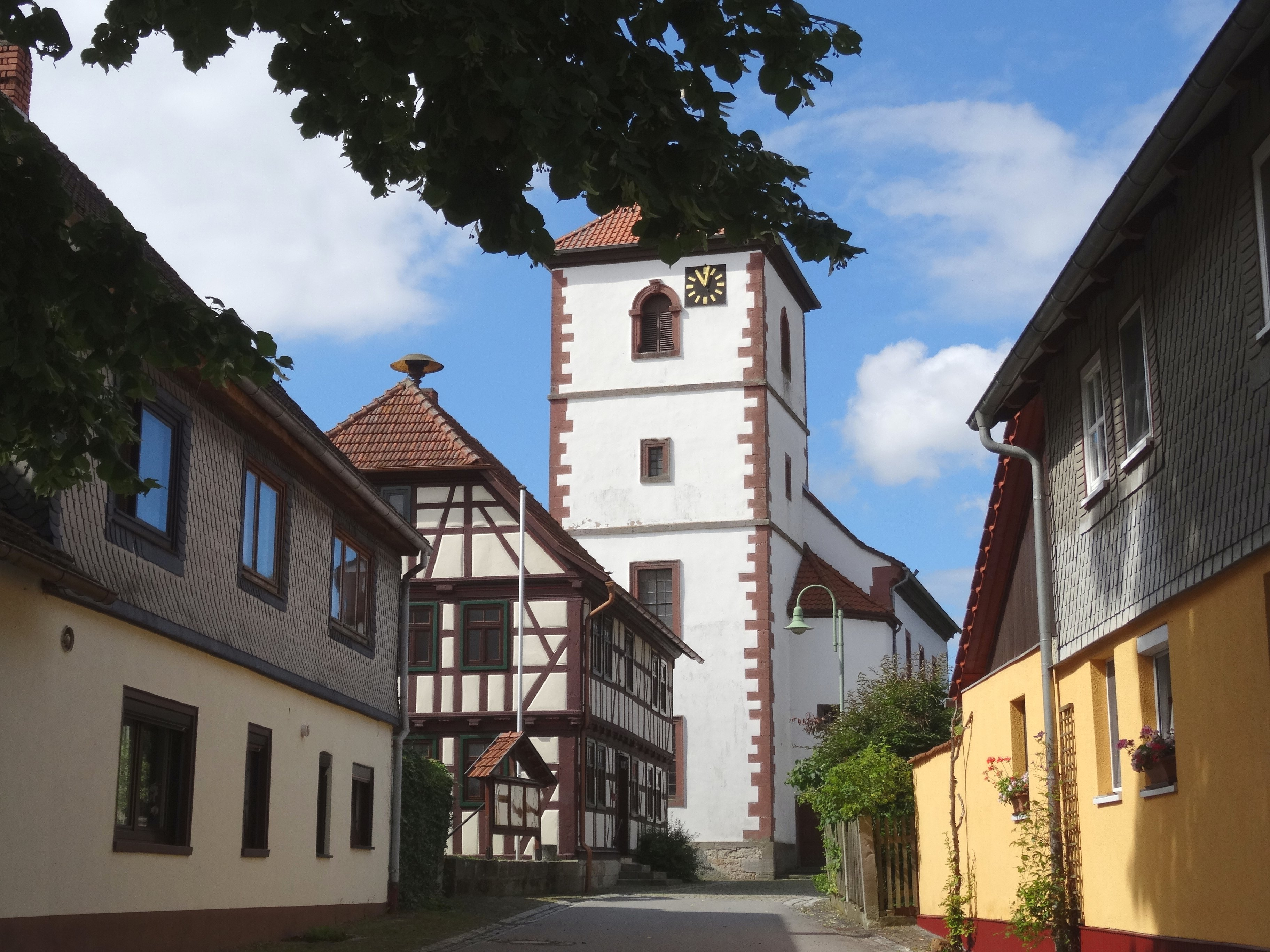 Wohlmuthausen, Blick zur Kirche